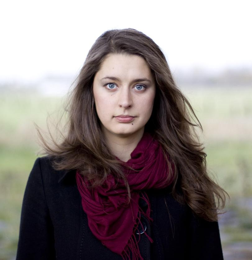 Katharina Nocun, Politikerin der Piratenpartei